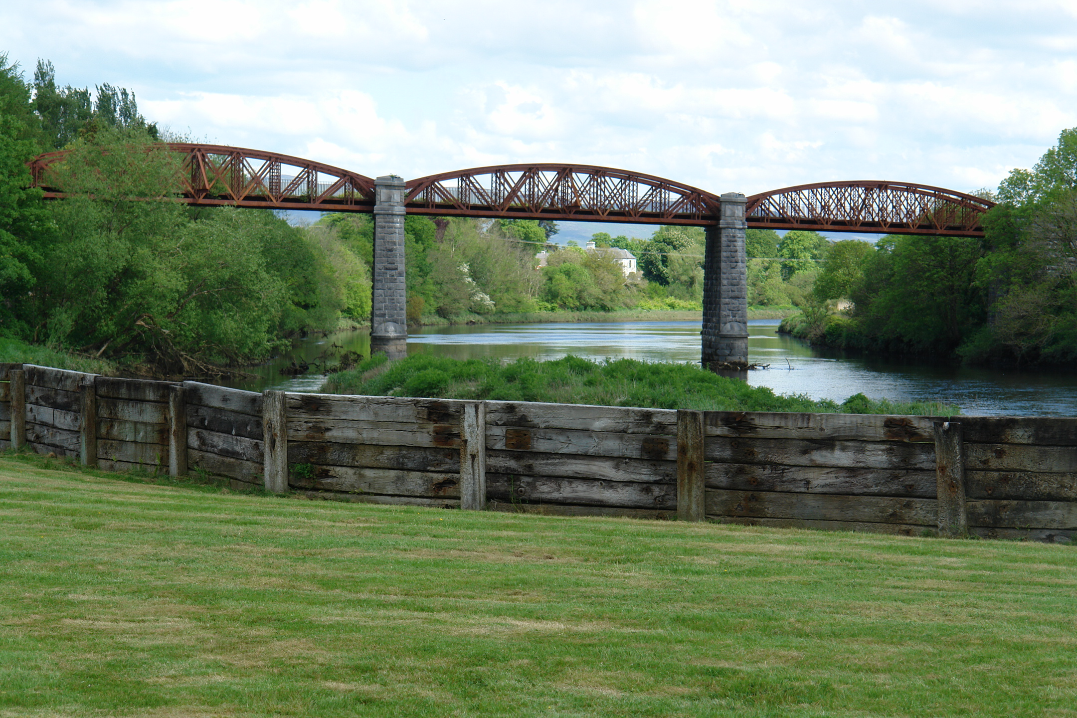 Viaduct of the Killorglin to Valentia Railway